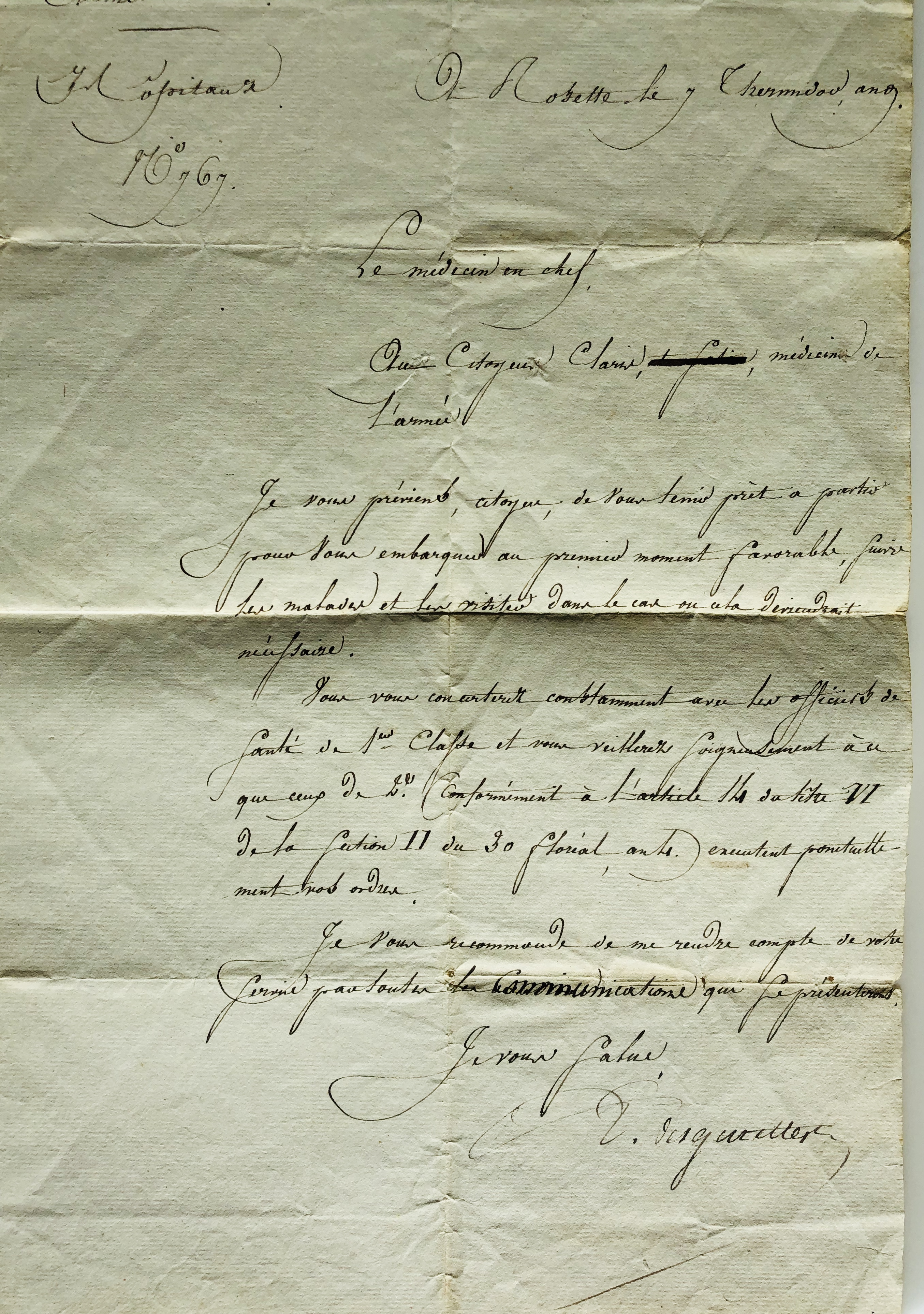 Lettre manuscite du médecin chef Desgenettes au médecin de première classe Claris pendant la campagne d'Egypte menée par Bonaparte